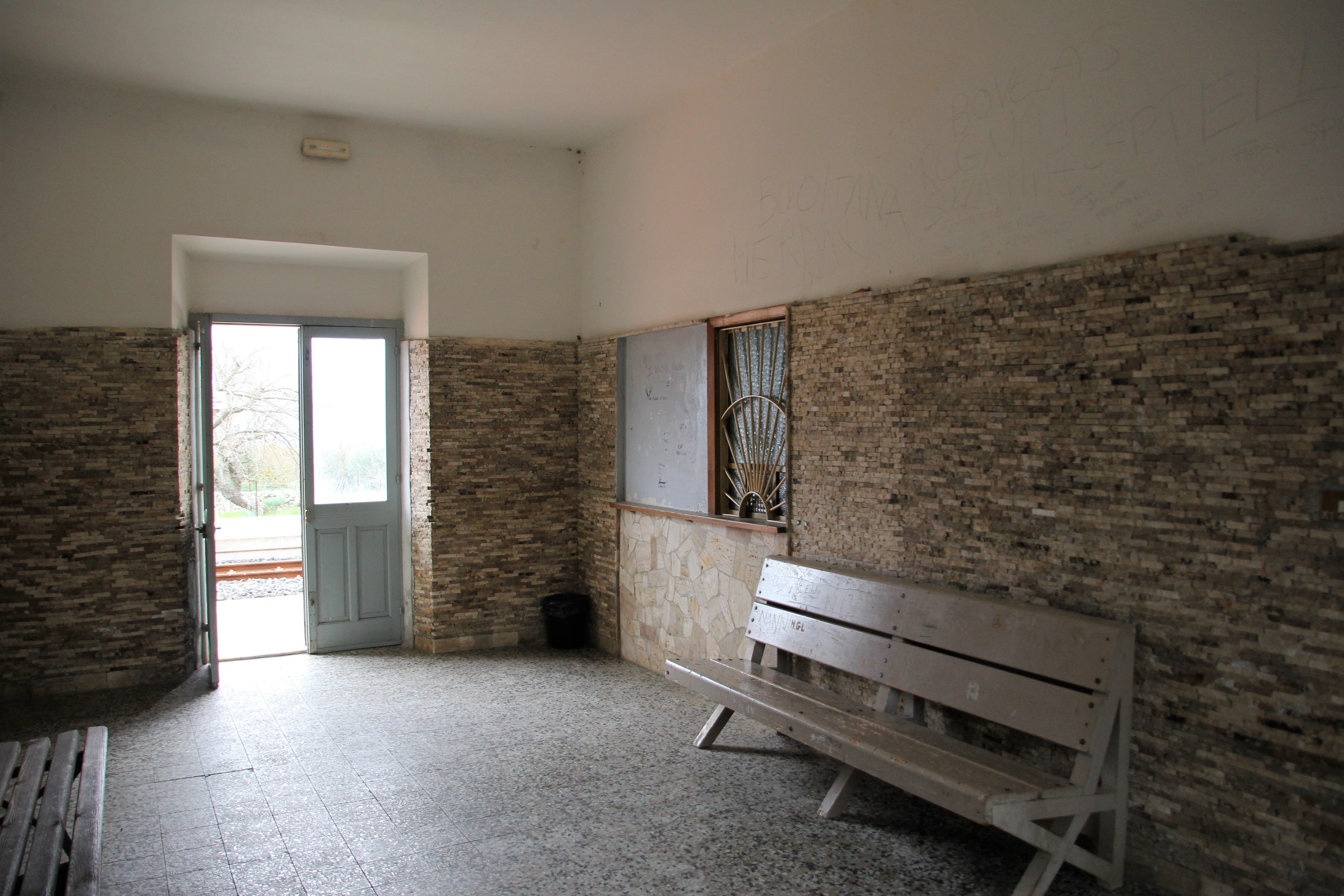 Bolotana, stazione ferroviaria